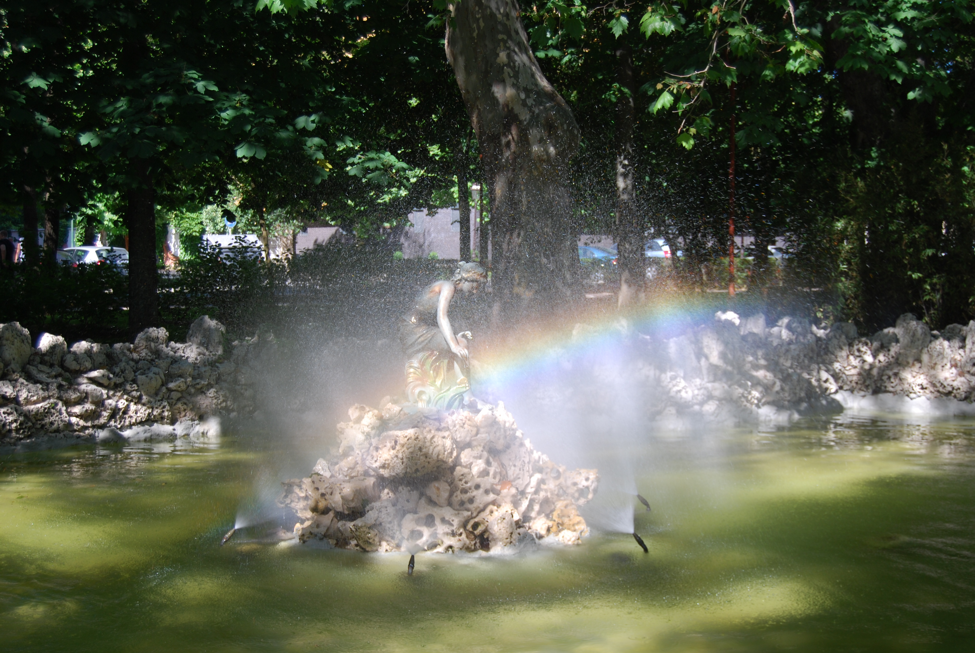 Detalle del Estanque de los Tritones del Paseo de la Isla de Burgos.